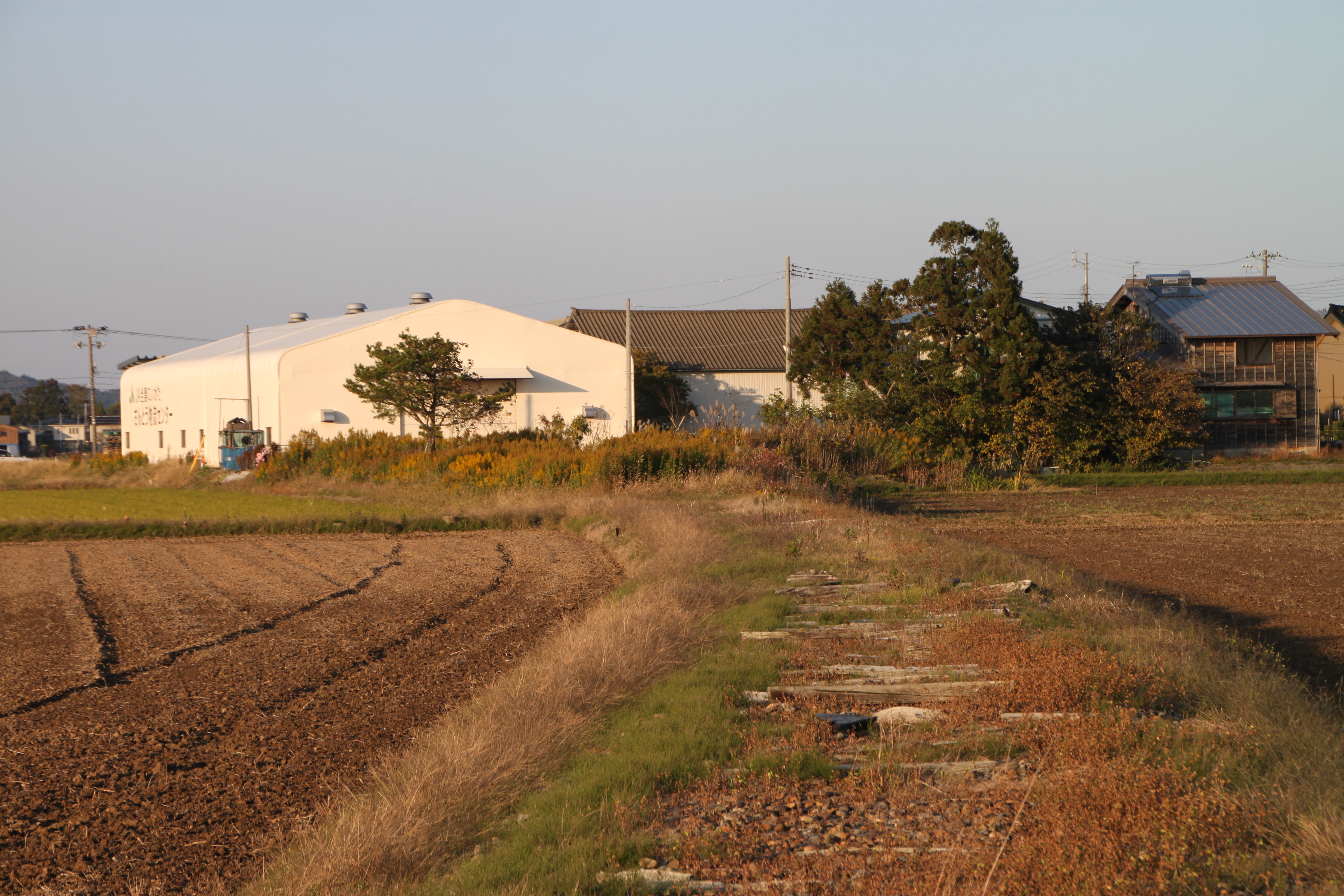 長岡鉄道脇野町駅跡。駅跡にはＪＡの倉庫が建っている。西長岡側から撮影。